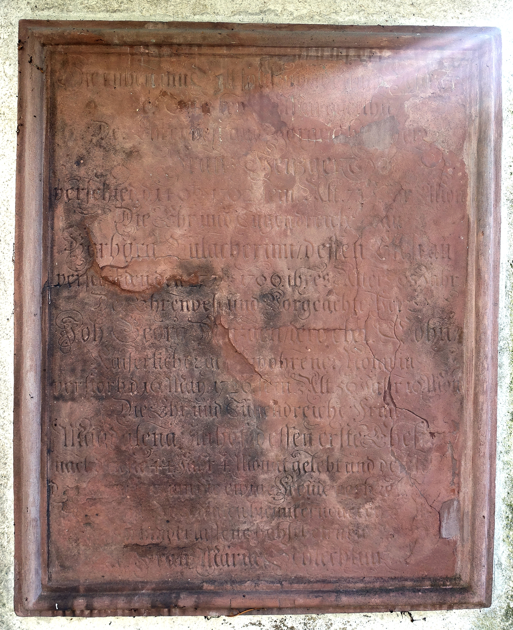 Das Epitaph der Familie Hentzgi. Hentzgi wurde zu St.Margarethen zur letzte Ruhe gebettet, wo auch seine Frau und sein Sohn Hans Georg mit dessen Gattin ihre Grablege erhielten. Grabinschrift :"Hier ruhen in Gott folgende weiland Besitzere des Guths bey St.Margaretha: Der Ehrenwert und Vorgeachtete Herr Franz Henzgen, verschied d.14. 8bs 1702 sein. Alt. 73 Jahr 8 Mon. Die Ehr- und Tugendreiche Frau Barbara Bülacherinn, dessen Ehefrau, verschieden den 27. 7bs 1706, ihres Alters 63 Jahr. Der Ehrenvest und Vorgeachtete Herr Joh. Georg Henzgen dero ehel. Sohn, Kaiserlicher geschworener Notarius, verstorb. d.16. May 1726 sein Alt. 56 Jahr 10 Mon. Die Ehr- und Tugendreiche Frau Magdalena Jmhof, dessen erste Ehefrau, nachdem sie 44 Jahr 4 Monat gelebt und demselben d.24. May 1713 inn die ewige Freude vorhergegangen. Dero samtl. Angedenken hiermit erneuern wollen dessen hinderlassene höhbetrübte Wittib etc. Frau Maria Schlechtinn."